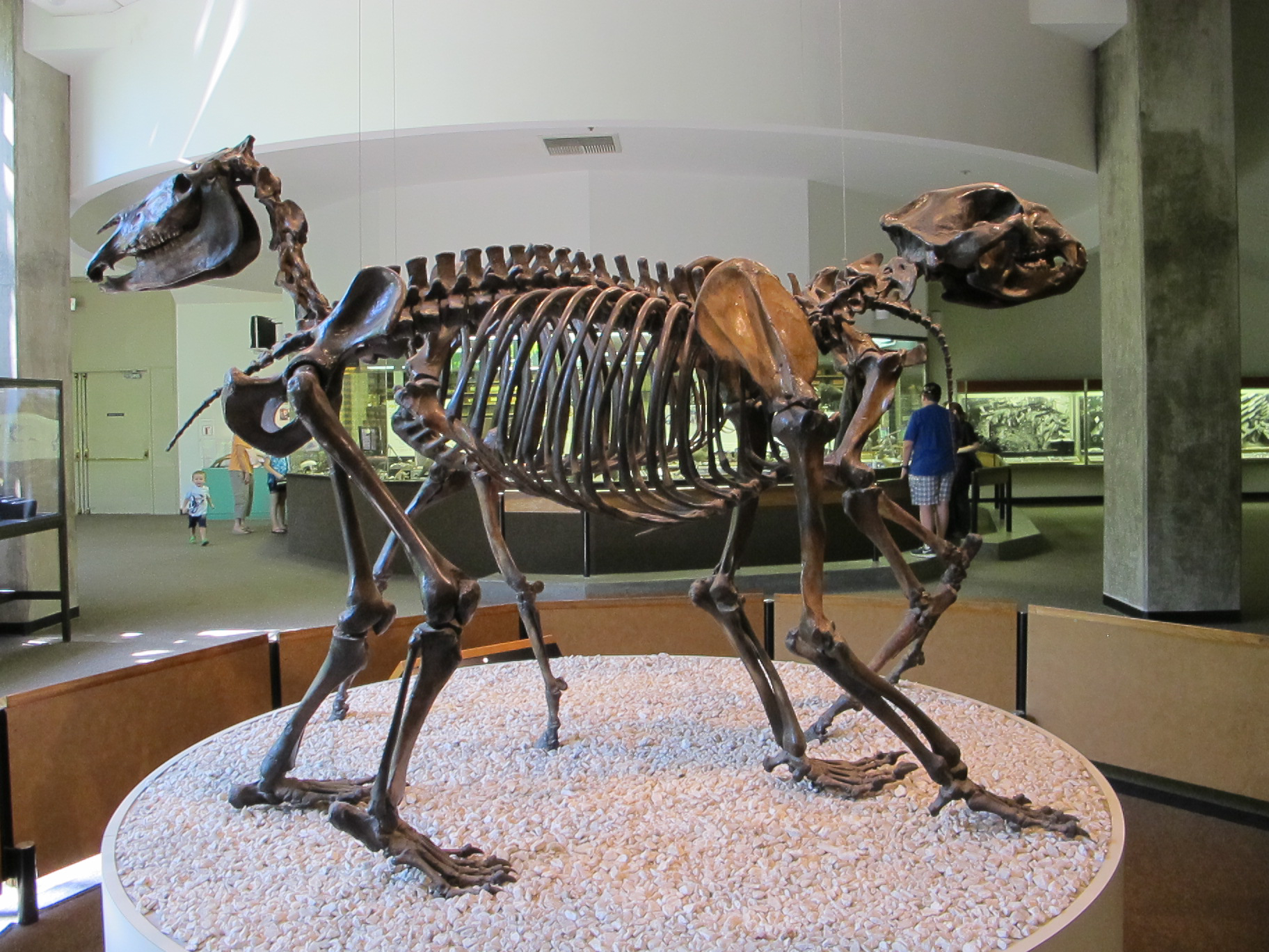 La Brea Tar Pits, Los Angeles